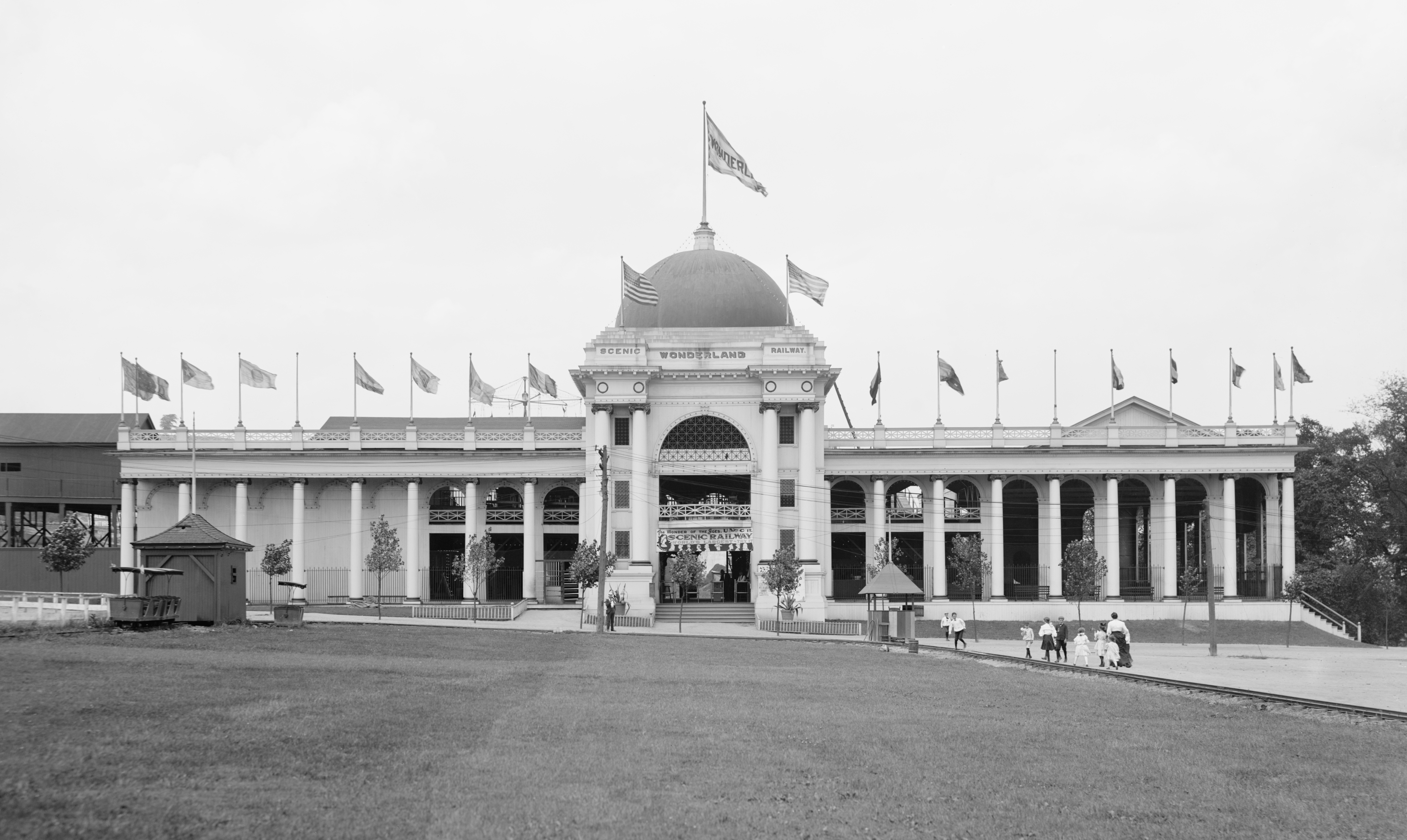 Wonderland, Kennywood Park, near Pittsburg, Pennsylvania, USA.